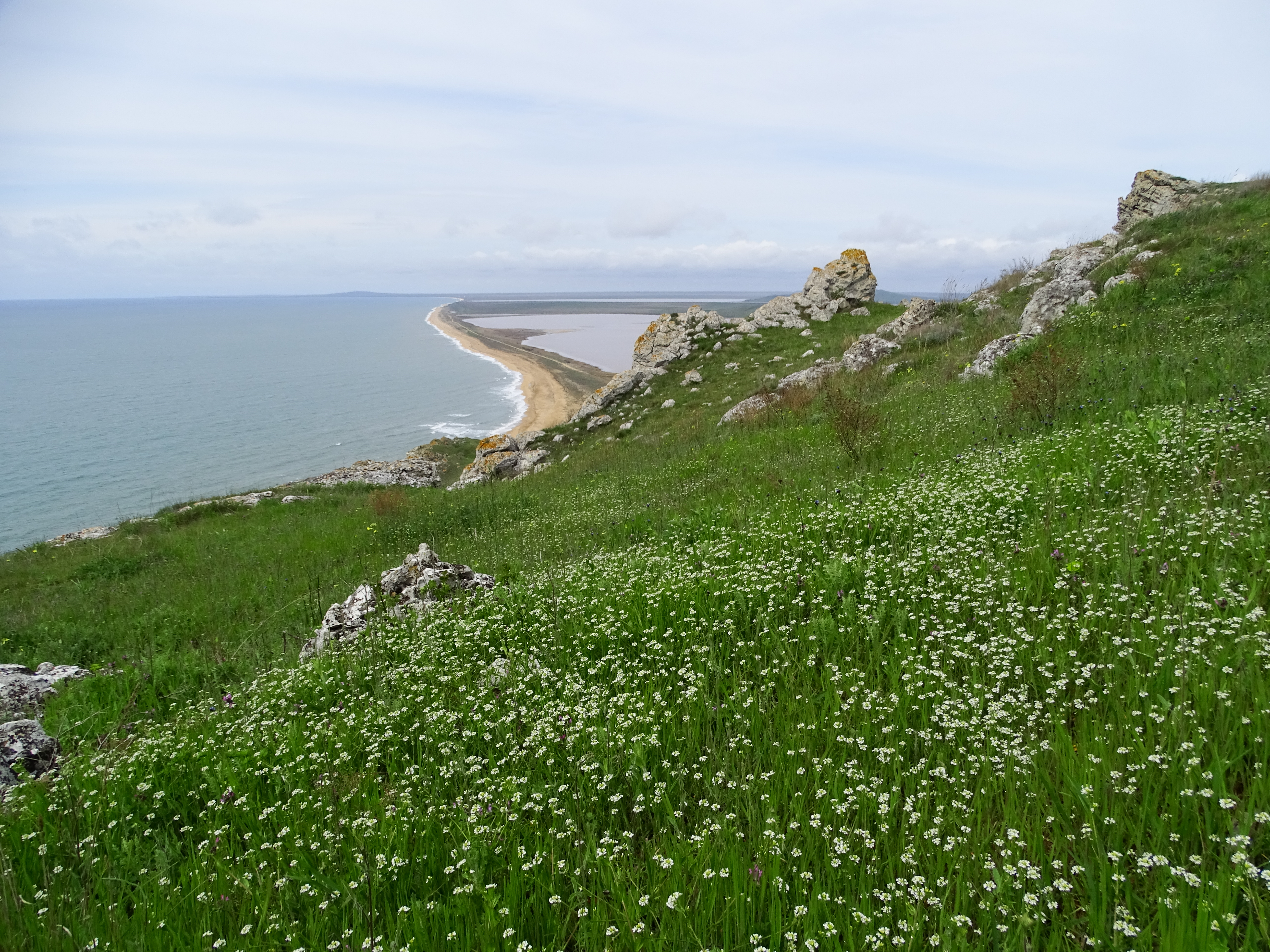 Опукський ПЗ, Ленінський р-н, с. Яковенкове, вул.. Чорноморська, 1а